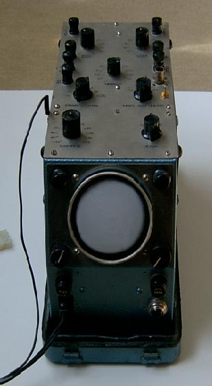 Oszilloskop älterer Bauart, Hersteller unbekannt